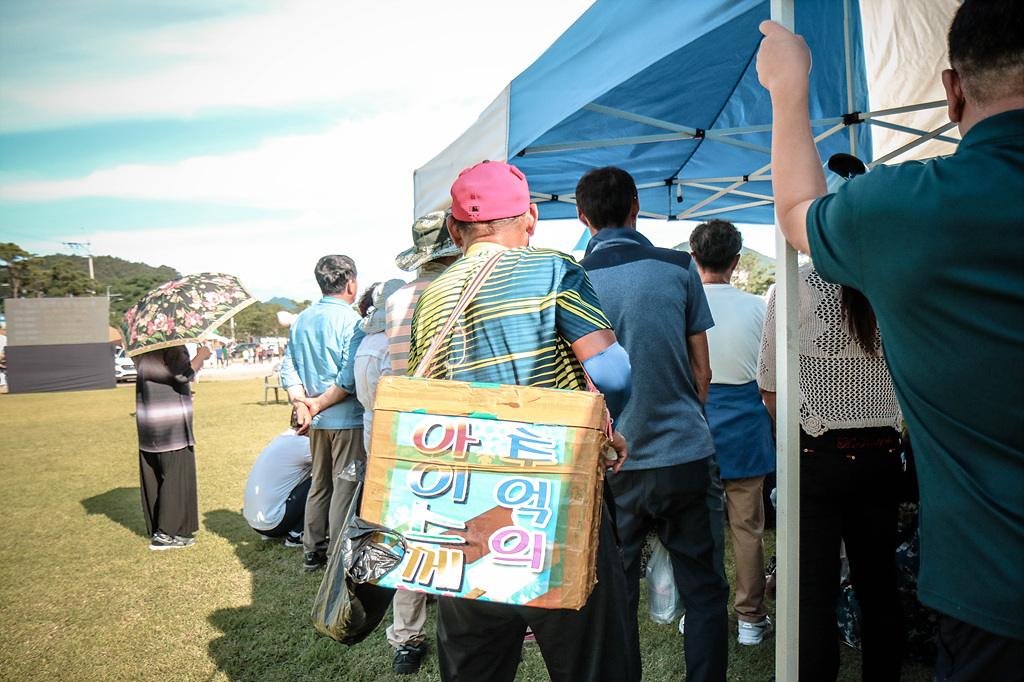 오늘날의 아이스께키 판매상이다. 2017년에 우연히 촬영하였다.